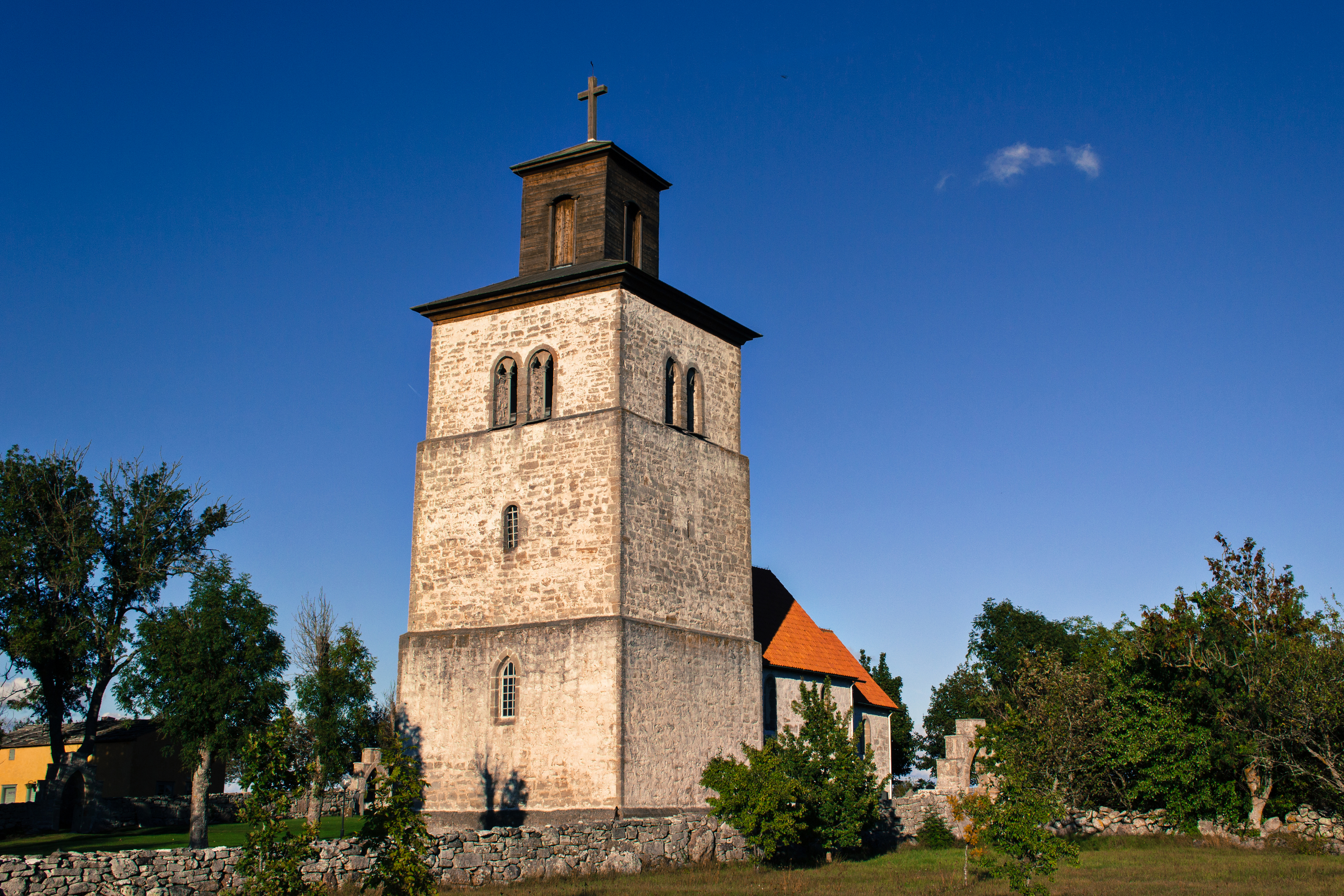 Igrexa de Fide, na illa sueca de Gotland.